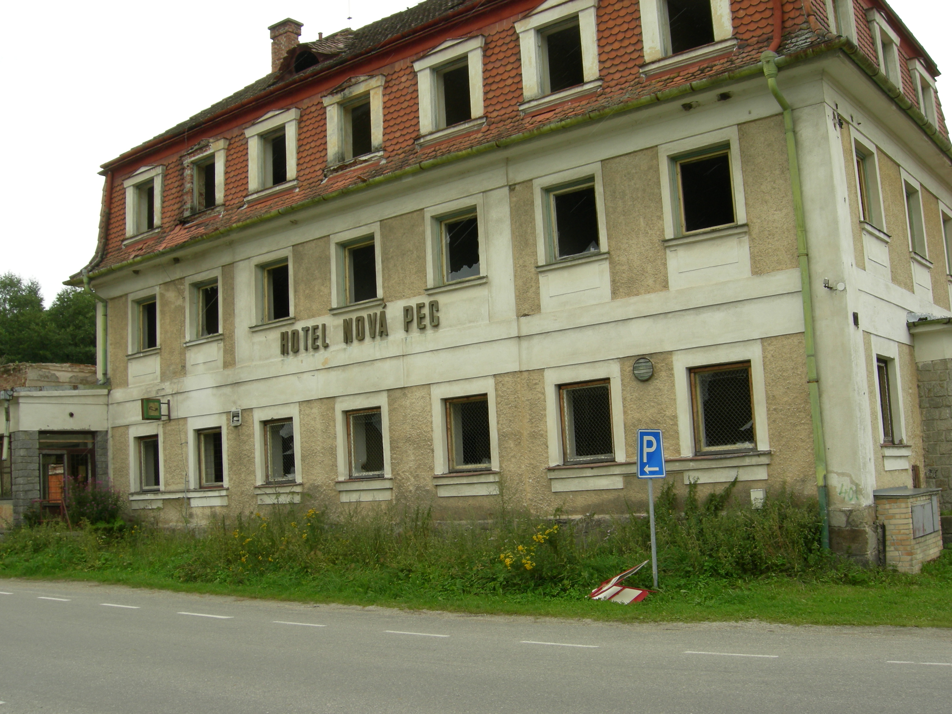 Hotel Nova Pec*****